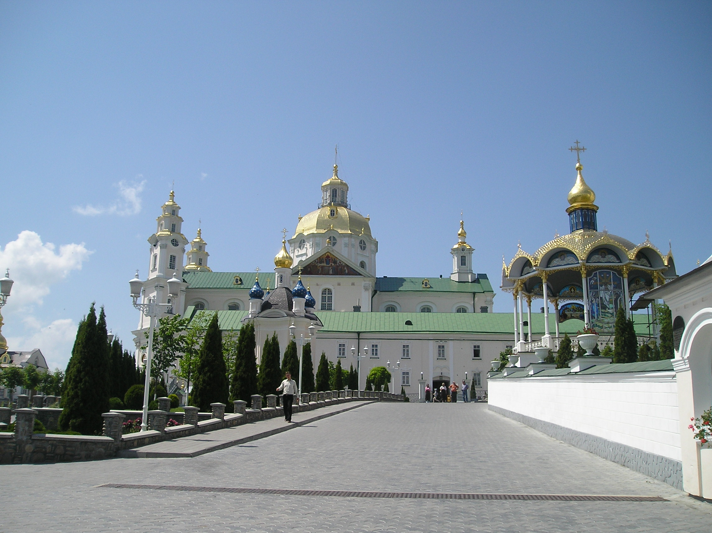 Ławra Poczajowska